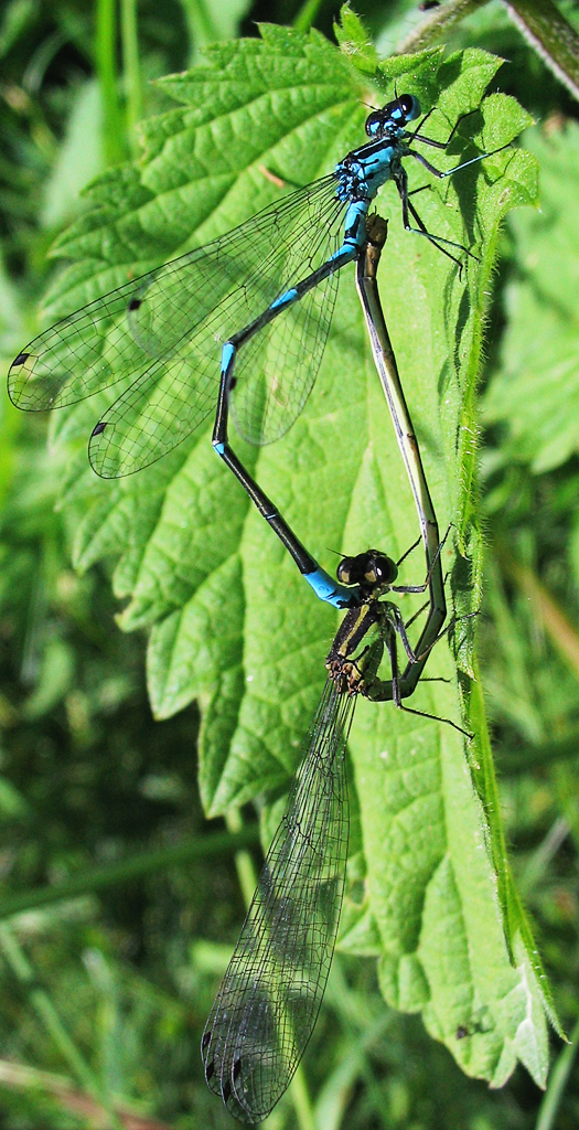 Beschreibung: Fledermaus-Azurjungfer (Coenagrion pulchellum) Fotograf: Darkone, 18. Juni 2005